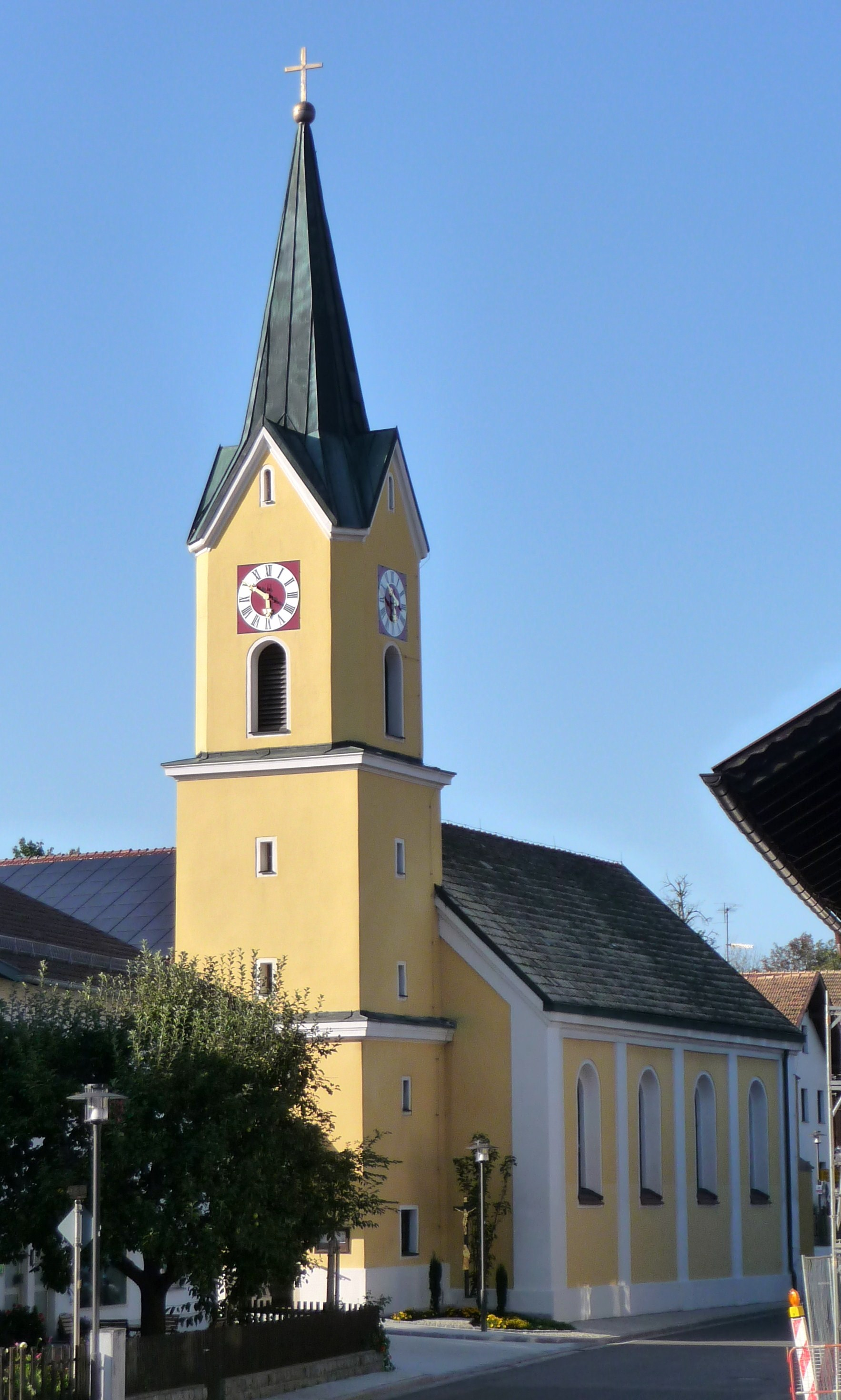 Die Pfarrkirche Mariä Verkündigung in Zandt